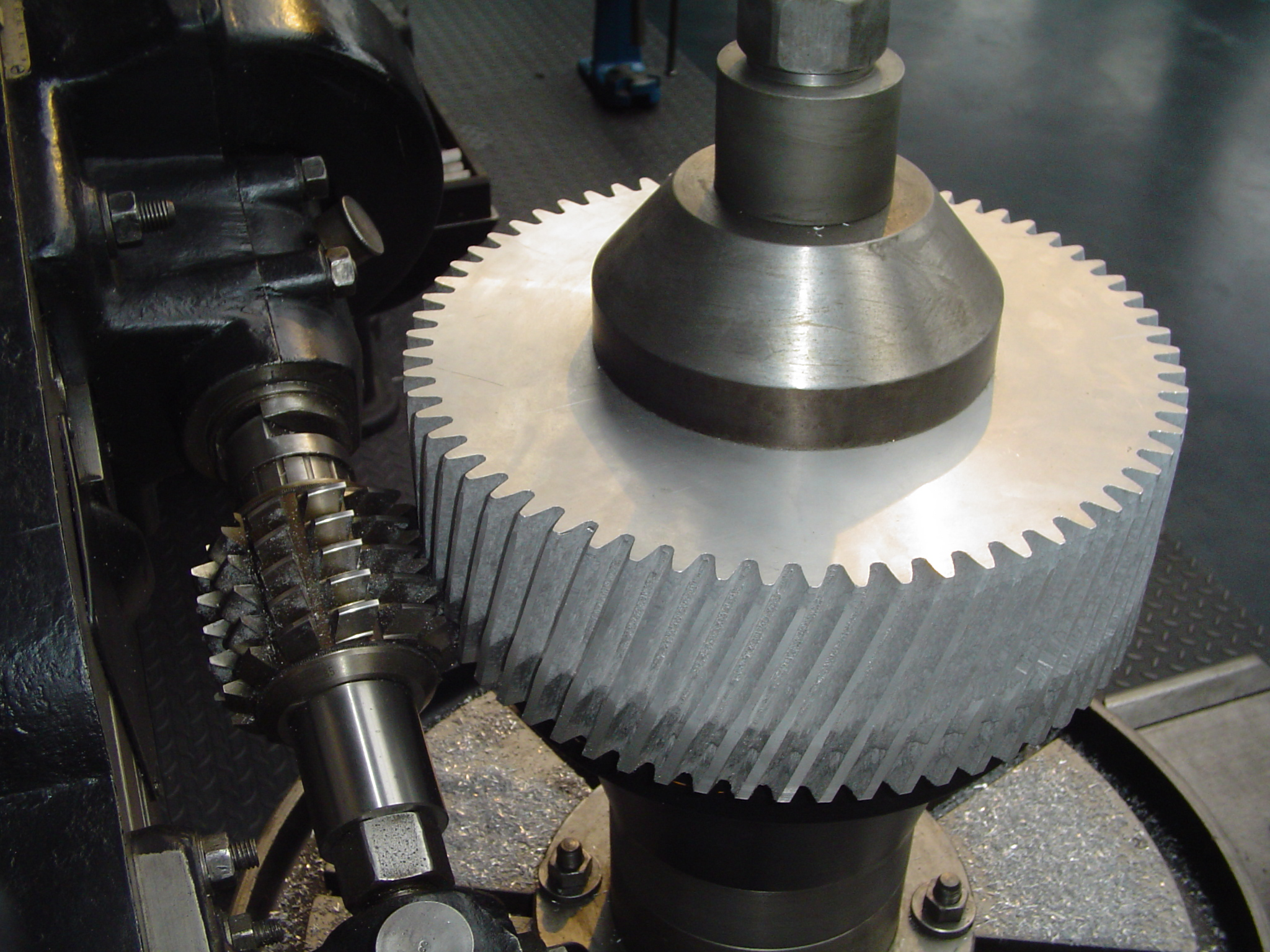 Aufgenommen im Sächsischen Industriemuseum (mit Fotoerlaubnis) Historische Wälzfräsmaschine zur Zahnradherstellung